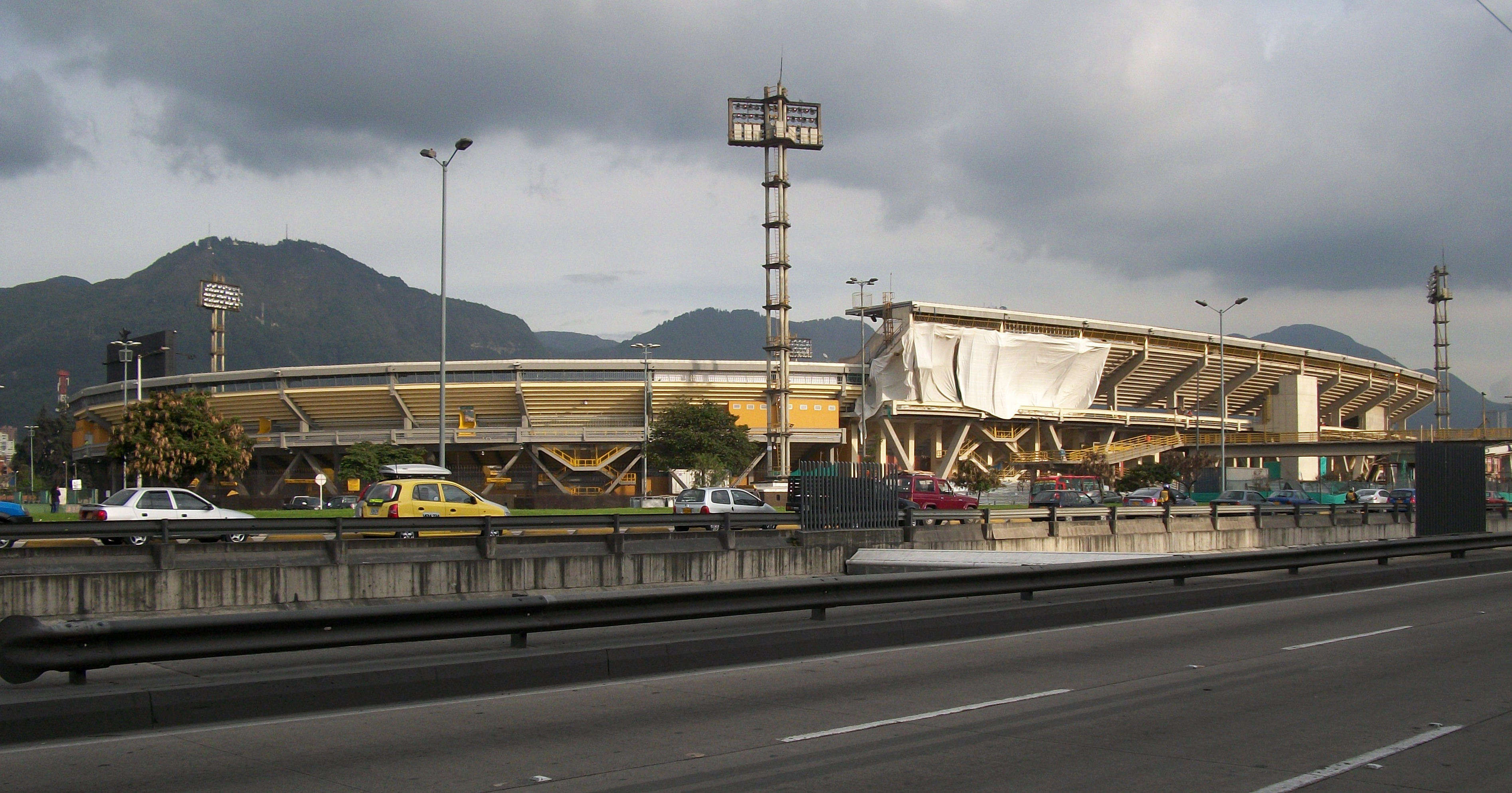 Costado noroccidental del estadio El Campin, de Bogotá.